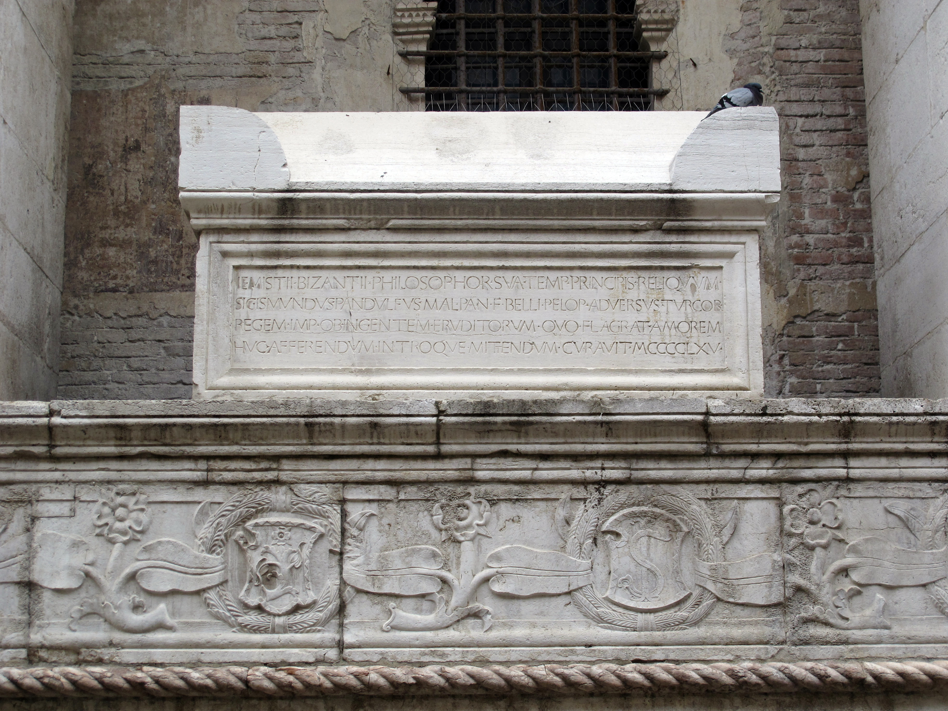 Tempio Malatestiano - MIBAC This is a photo of a monument which is part of cultural heritage of Italy.